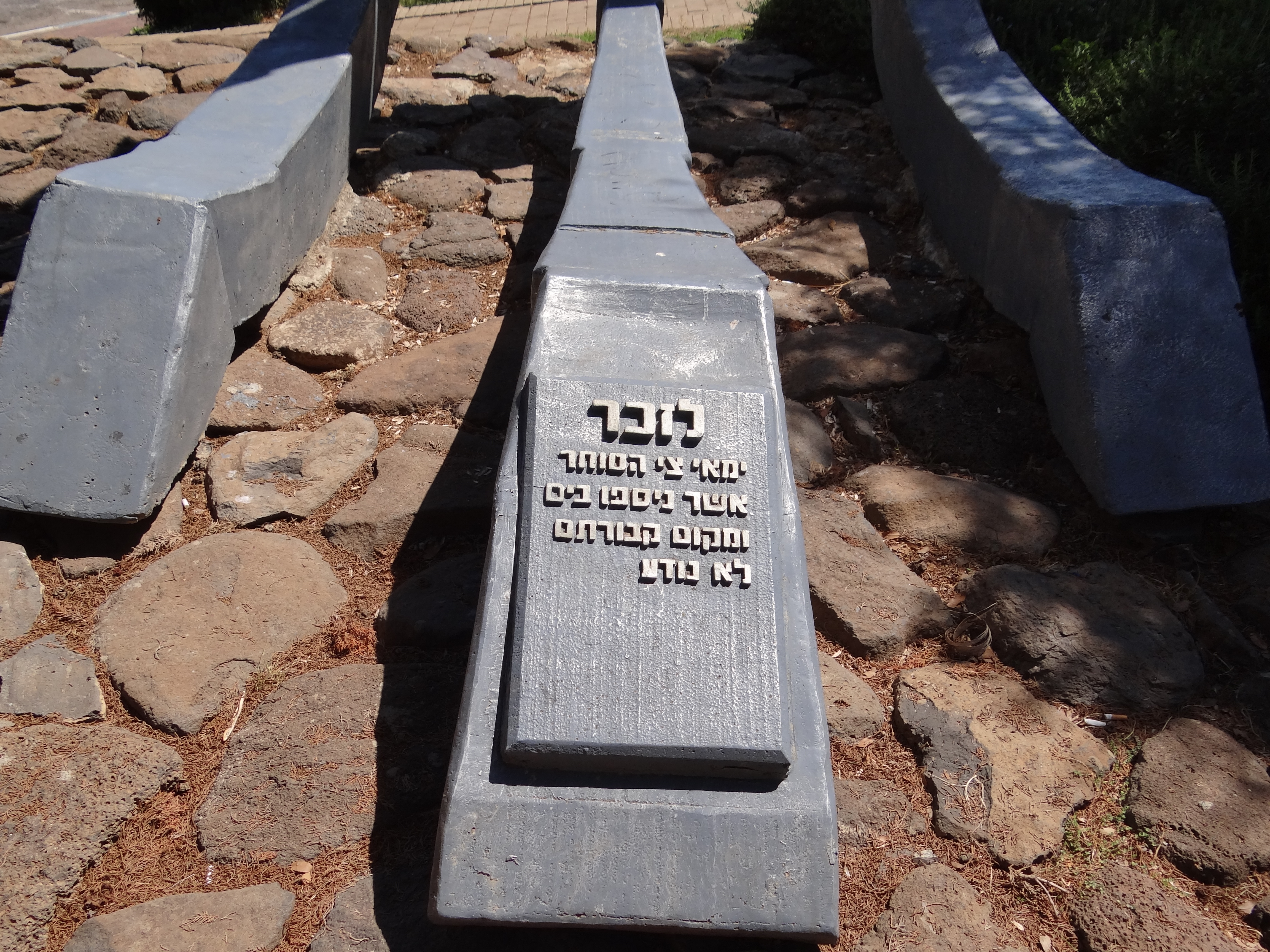 Memorial merchant mariner whose place of burial is unknown in Haifa, Israel אתר ההנצחה לימאי צי הסוחר שמקום קבורתם לא נודע, הממוקם בעיר חיפה, מוקדש להנצחת שמותיהם של ימאים נעדרים מאוניות צי הסוחר הישראלי, שניספו בים.